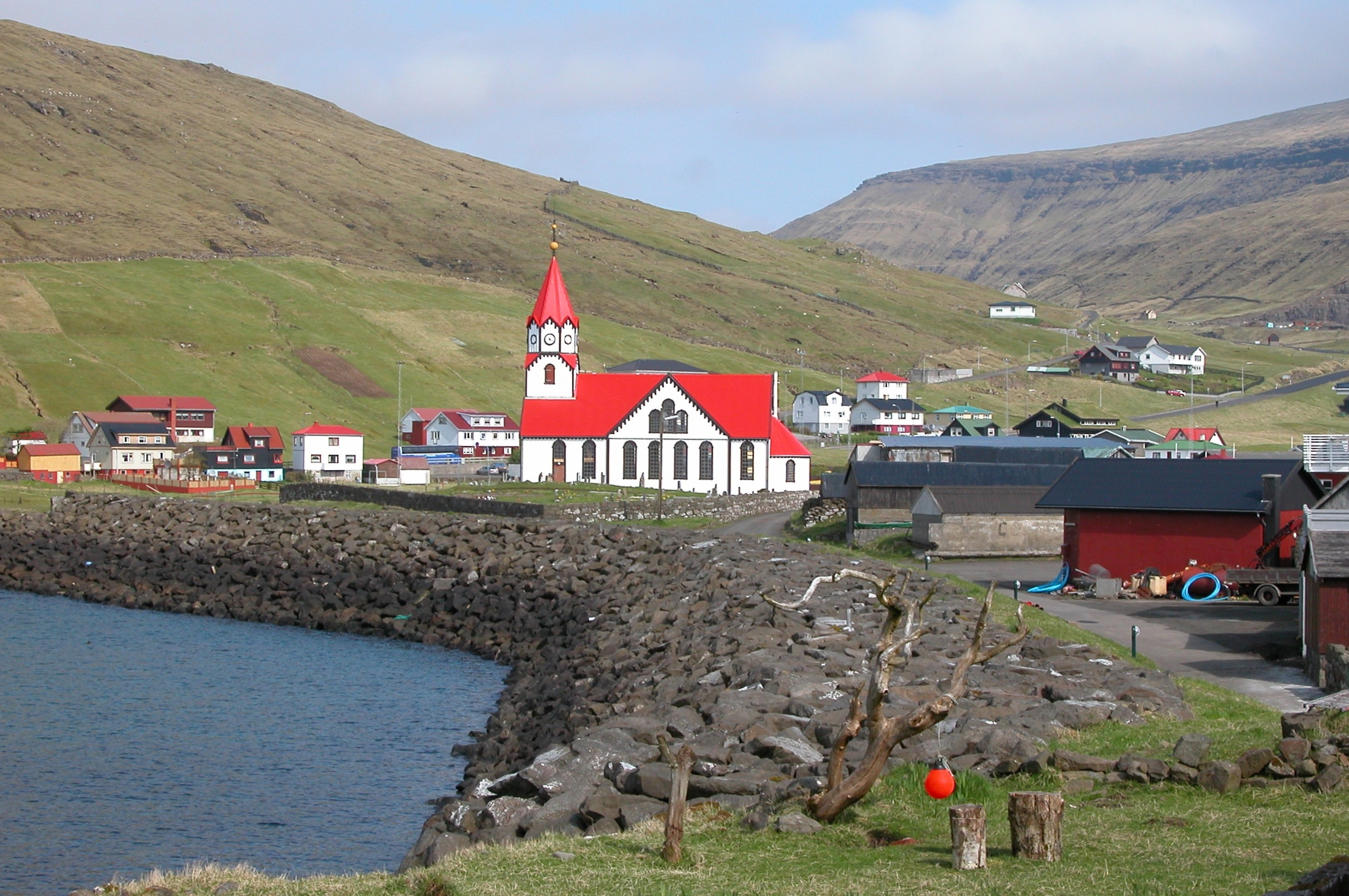 Sandavágur on Vágar, Faroe Islands.